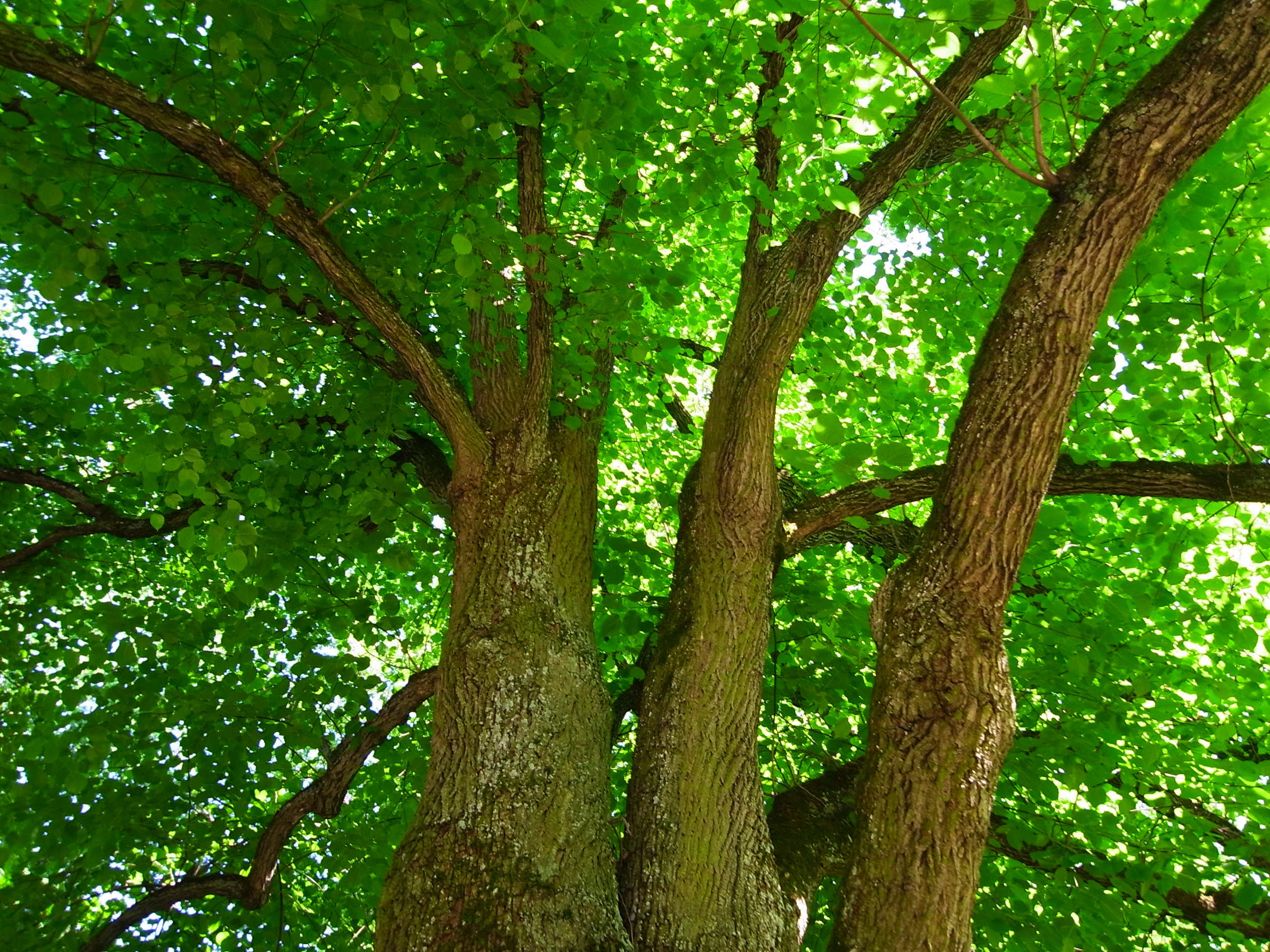 Lindengrün, Landesarboretum Baden-Württemberg, Hohenheimer Gärten